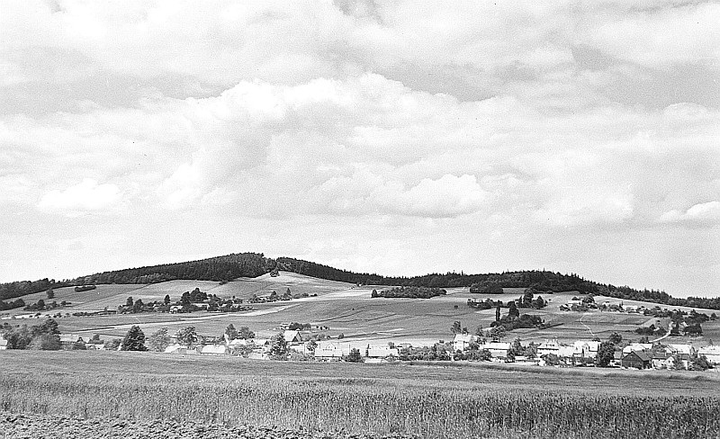 Original image description from the Deutsche Fotothek Beiersdorf. Blick von der Hadermühle auf den Bieleboh